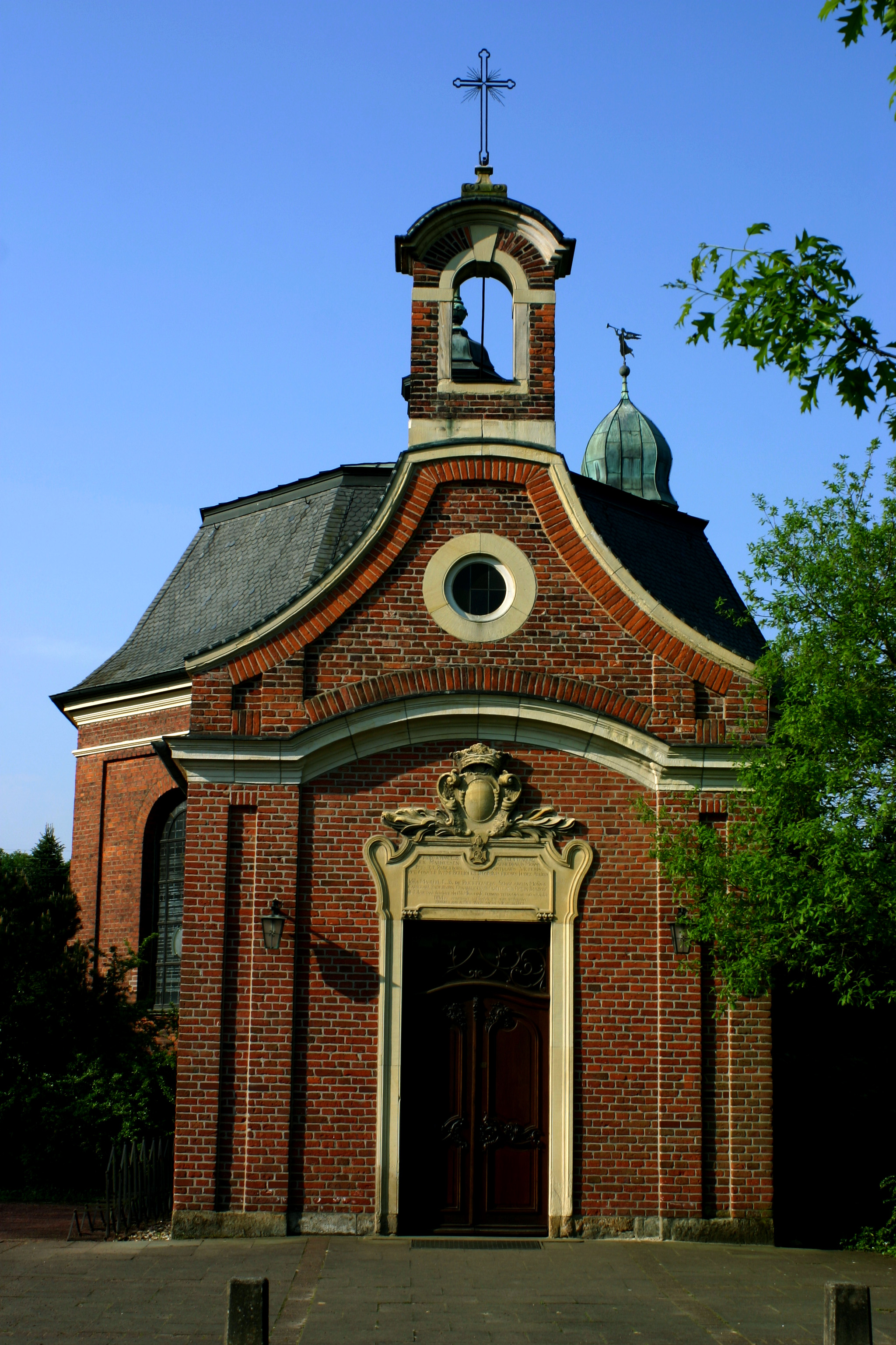 Pfarrkirche der Gemeinde St. Mariä Himmelfahrt, Münster (Dykburg)